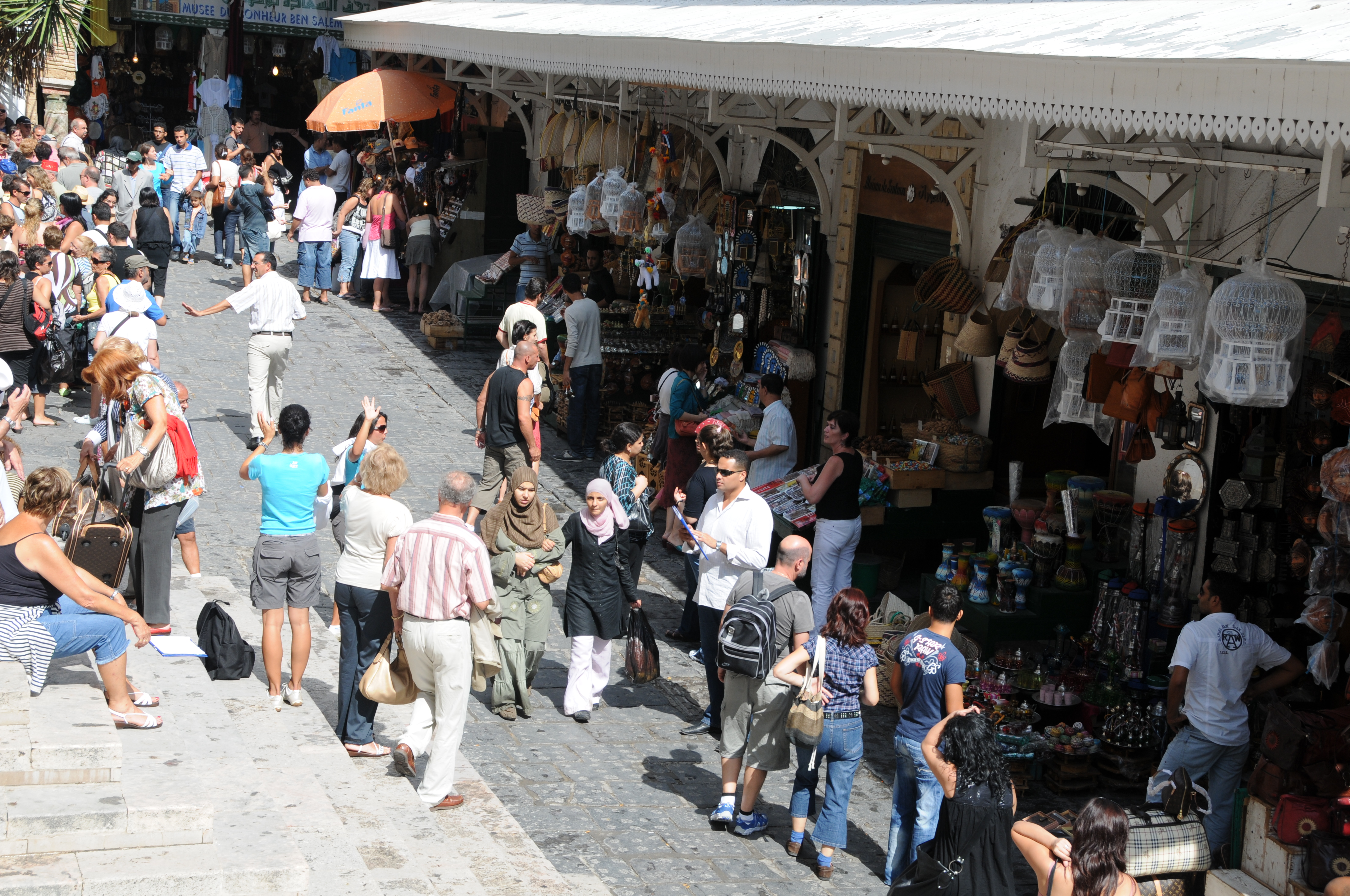 Ambiance du souk de la médina de Tunis en face de l'entrée de la mosquée de la Zitouna.